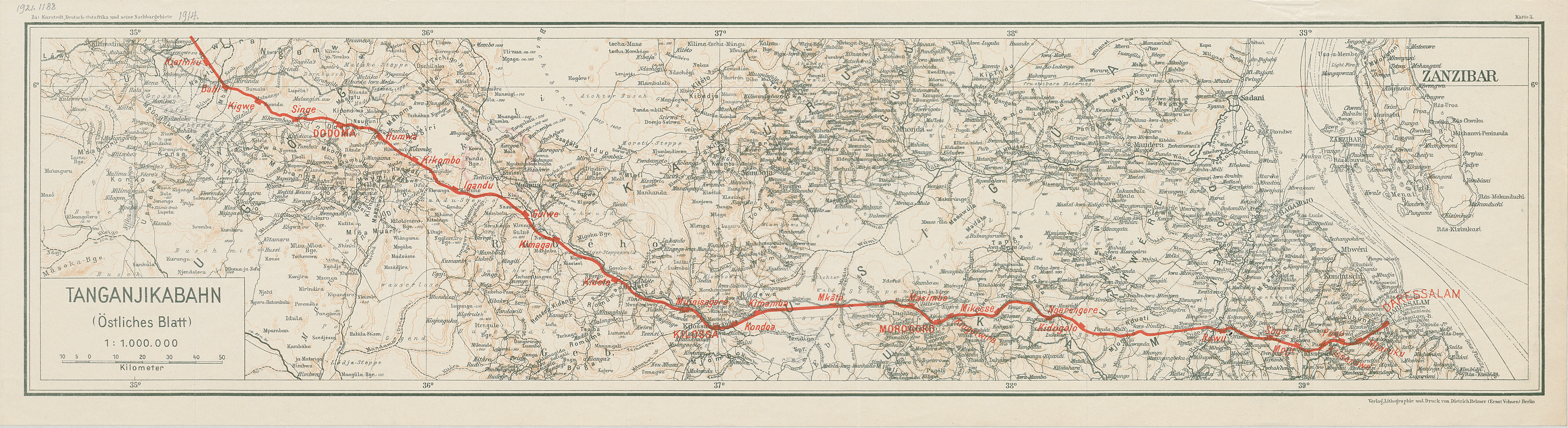 Tanganjikabahn (östliches Blatt)